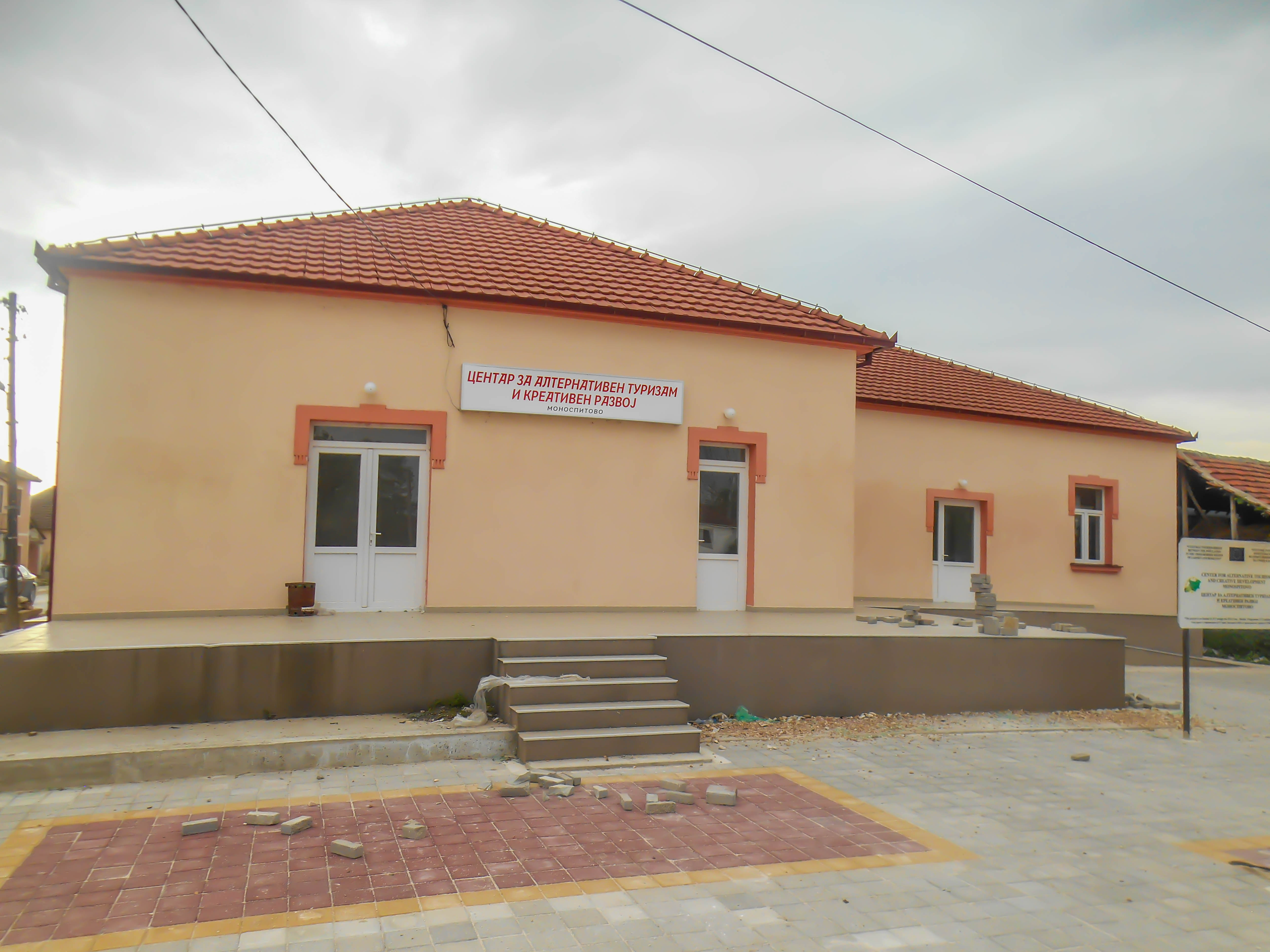 Центар за алтернативен туризам и креативен развој - Моноспитово